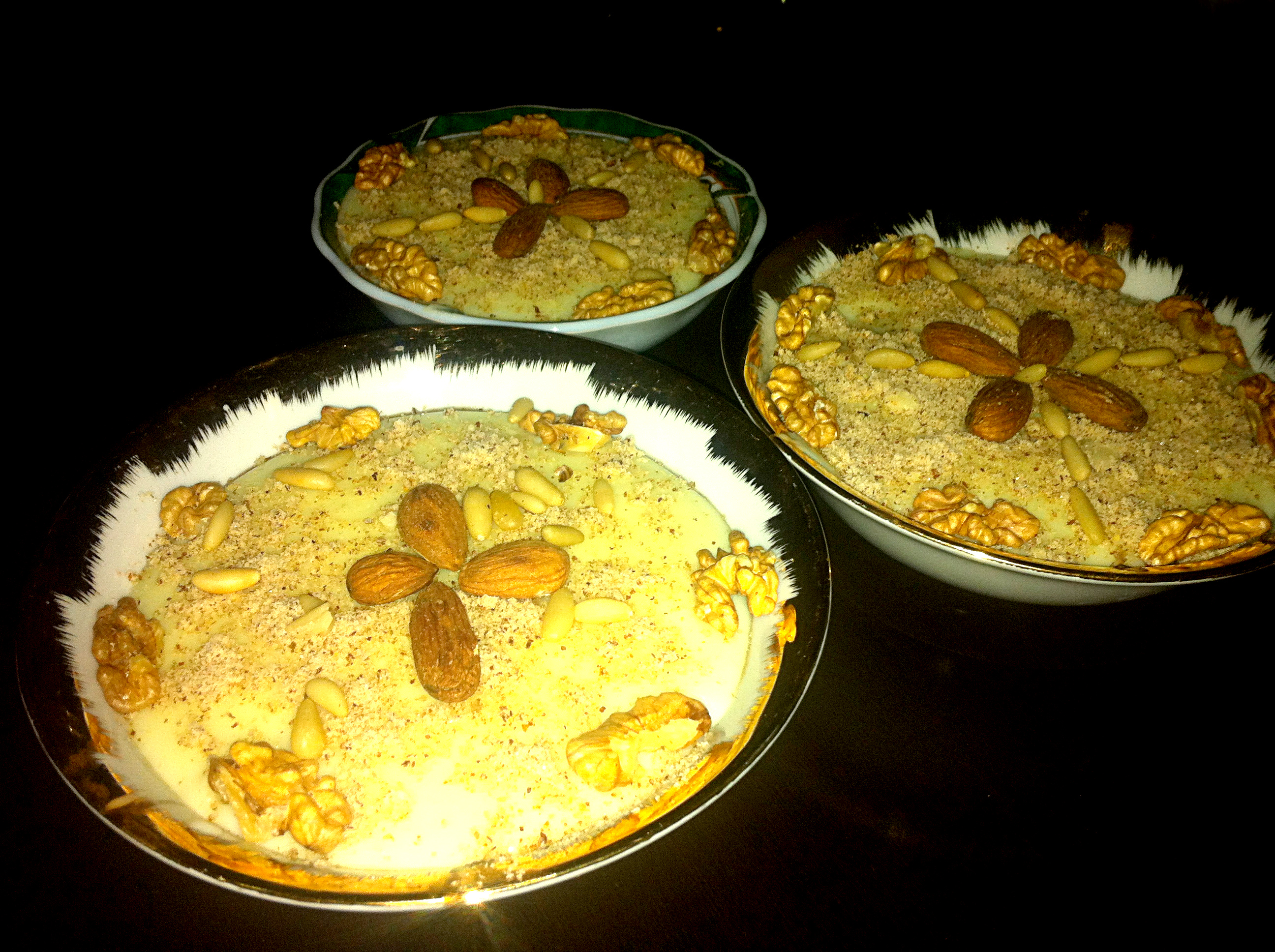 Trois bols d'assidat zgougou surmontée d'une crème blanche parsemée de fruits secs, plat tunisien pour la fête du Mouled